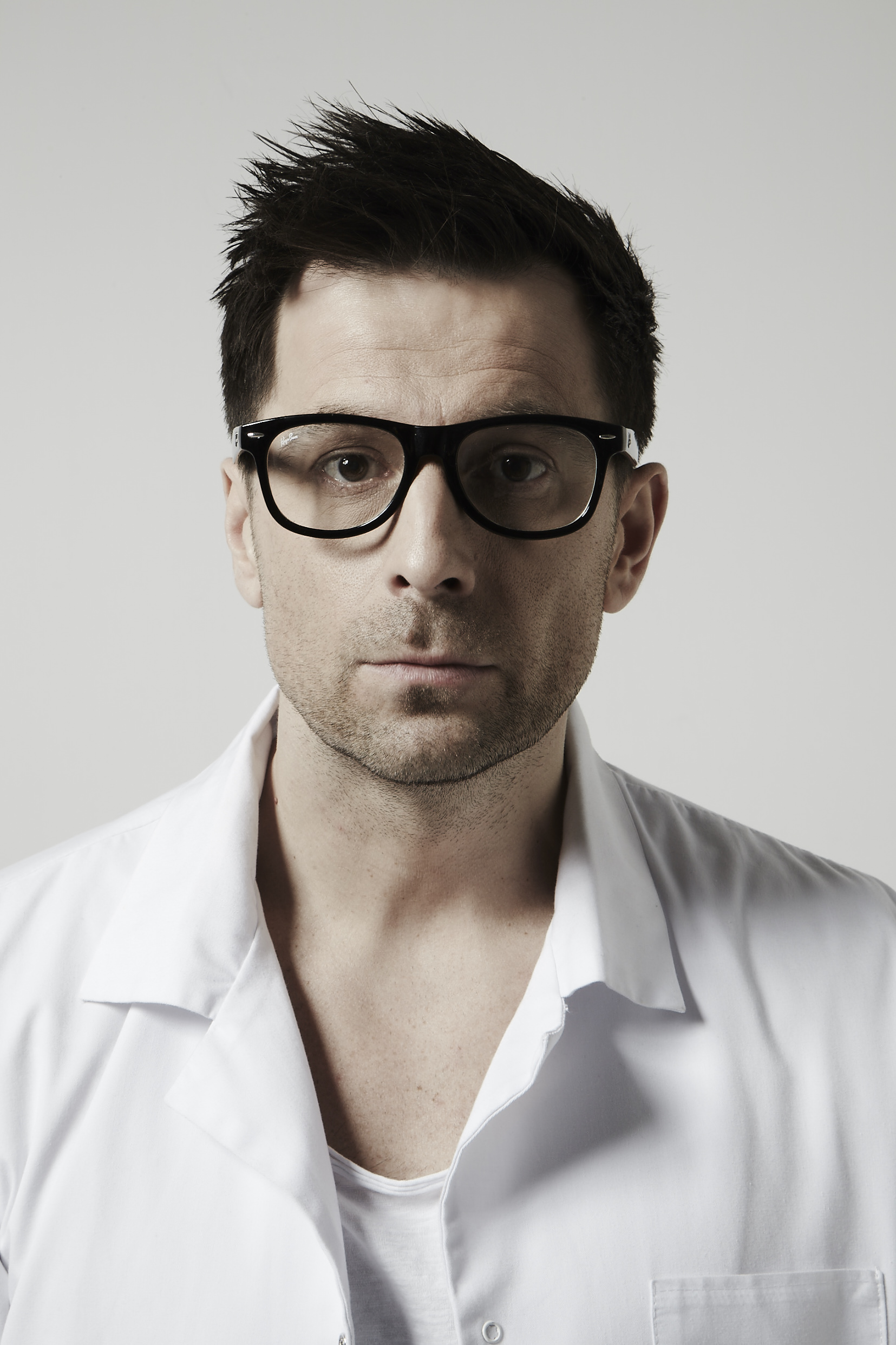 Robert Motyka jako Prozak.